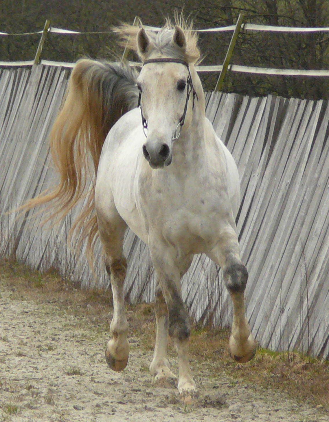 Etalon shagya gris au galop, vu de face